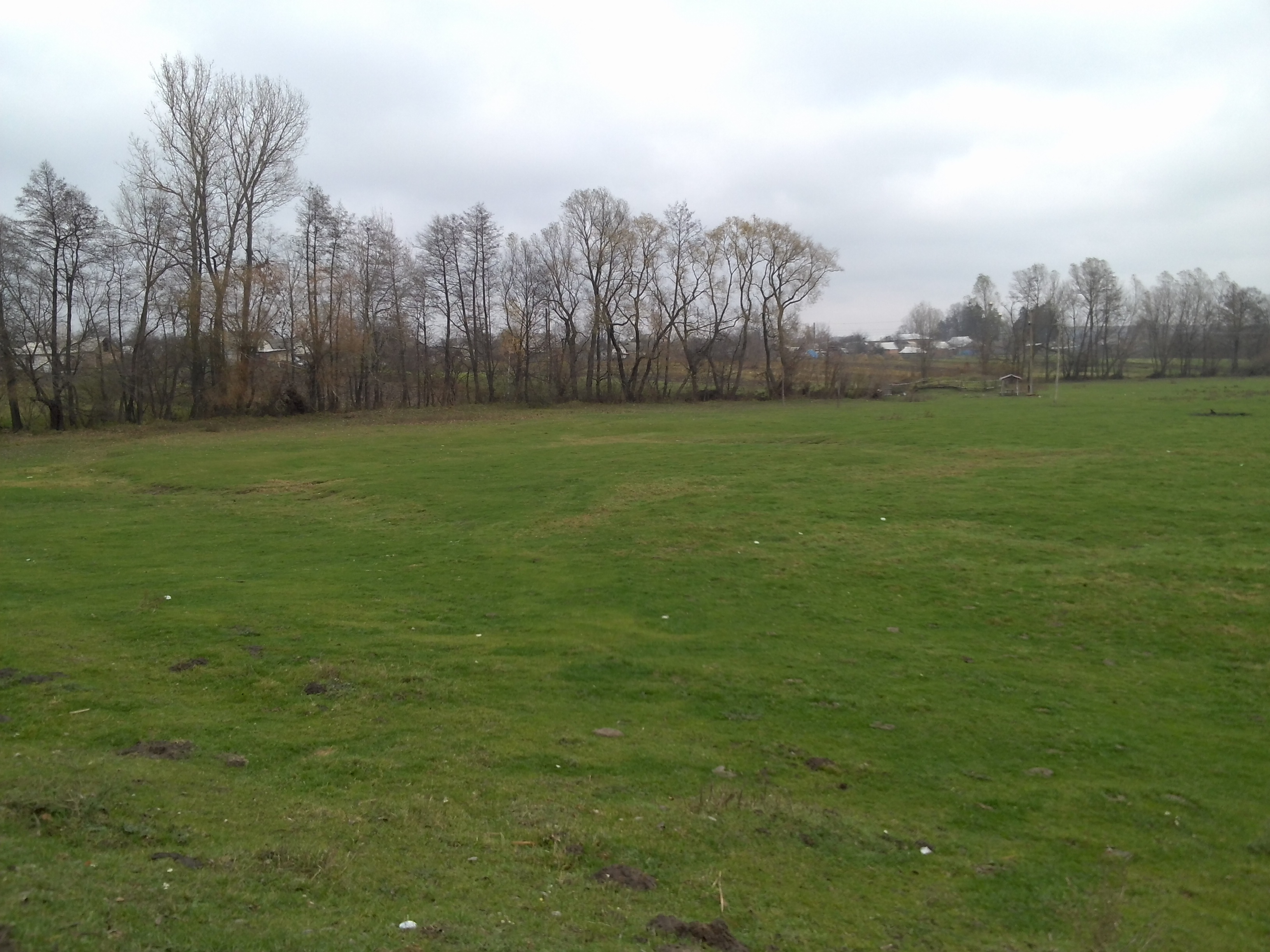 с. Косаківка. Панорама